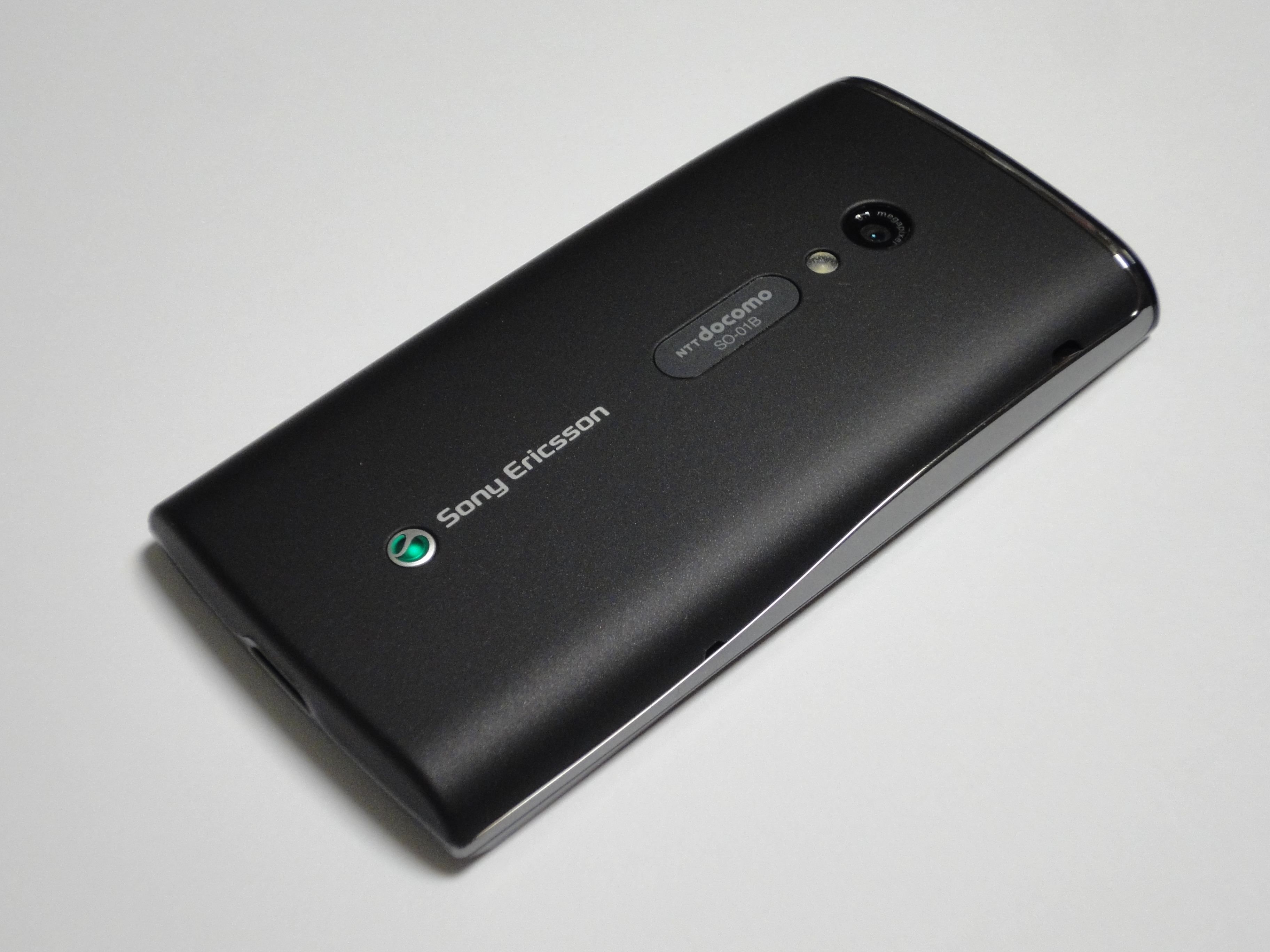 NTTドコモの第3世代移動通信システム(FOMA)対応スマートフォン、「Xperia SO-01B」の蓋側です。平成23(2011)年3月2日撮影。